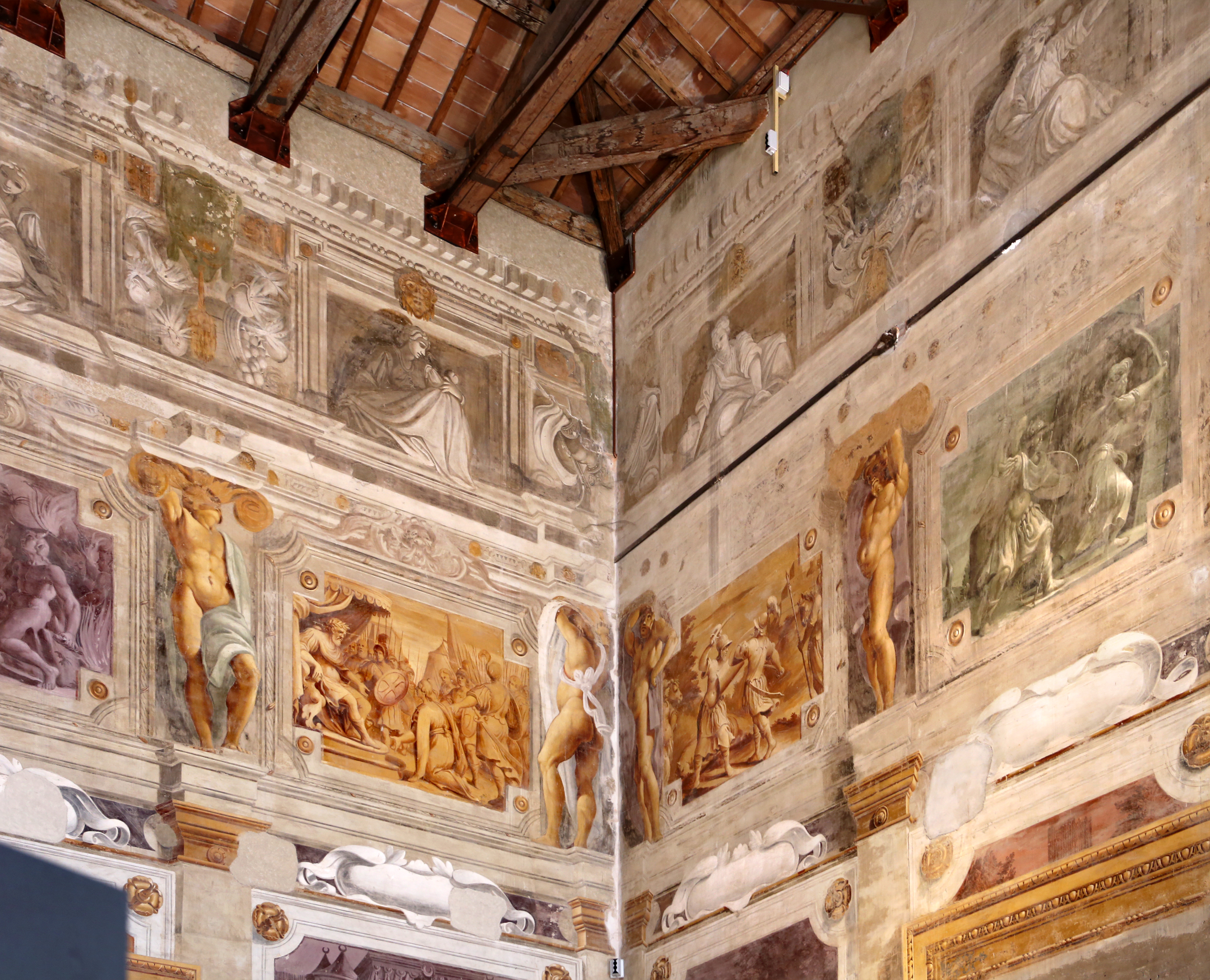 Palazzo Bentivoglio This is a photo of a monument which is part of cultural heritage of Italy.